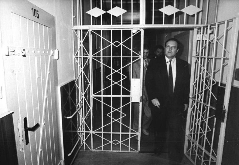 Bautzen, Volker Rühe besucht JVA ADN Matthias Hiekel 11.10.90 Bez. Dresden: Wahlkampf. Der Generalsekretär der CDU, Volker Rühe, besuchte am Rande einer Wahlkampfreise die Justizvollzugsanstalt Bautzen II. Er sprach sich für eine unverzügliche Klärung der von Anstaltsleitung und Gefangenen als noch nicht hinreichend überprüft bezeichneten Urteile aus. Abgebildete Personen: Rühe, Volker: MdB, CDU, Verteidigungsminister, Bundesrepublik Deutschland